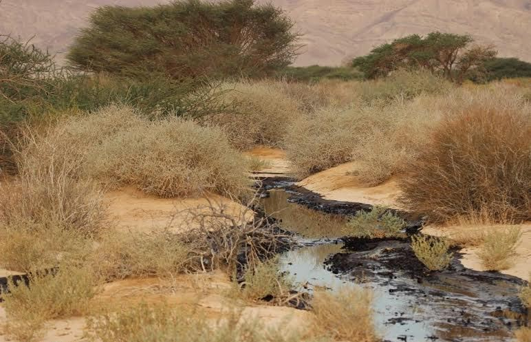 שרידי דליפת הדלק בשמורת הטבע בעברונה בנגב